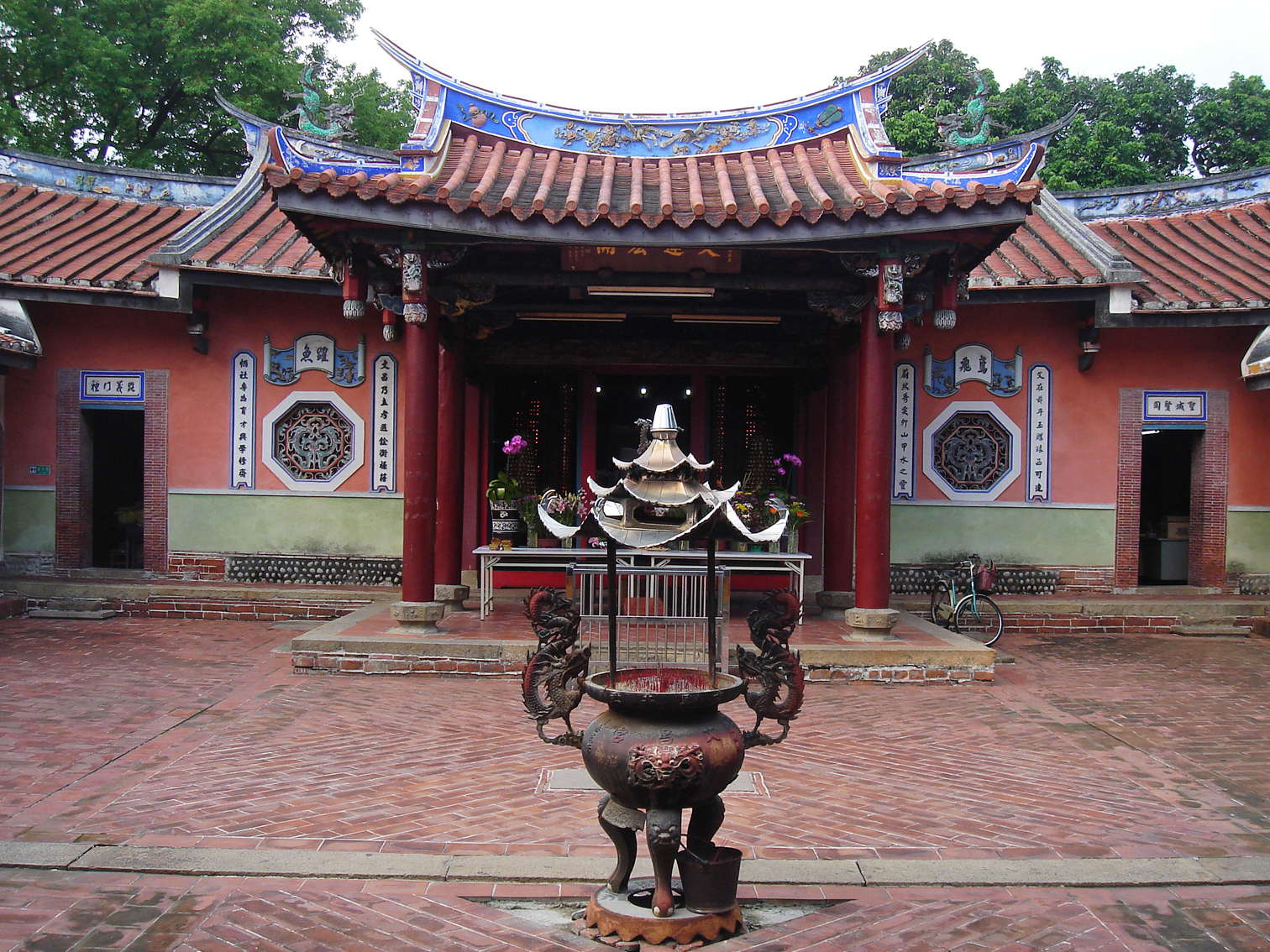 北屯文昌廟。